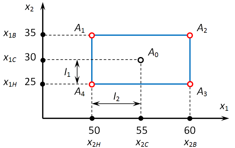 Экспериментальные точки полного двухфакторного эксперимента в двумерном факторном пространстве.